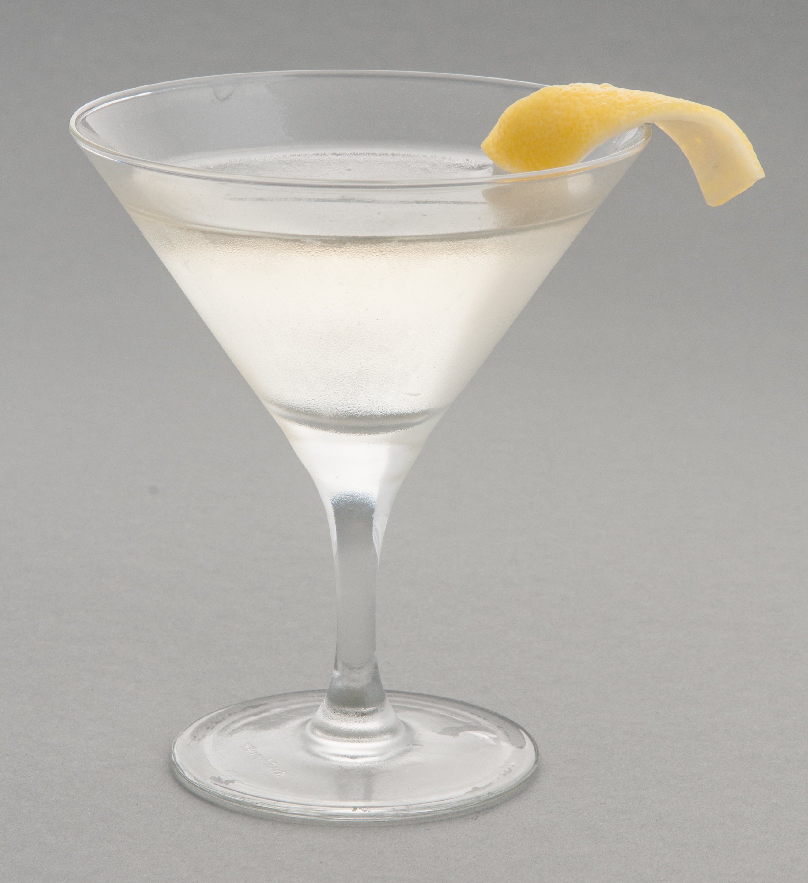 Martini